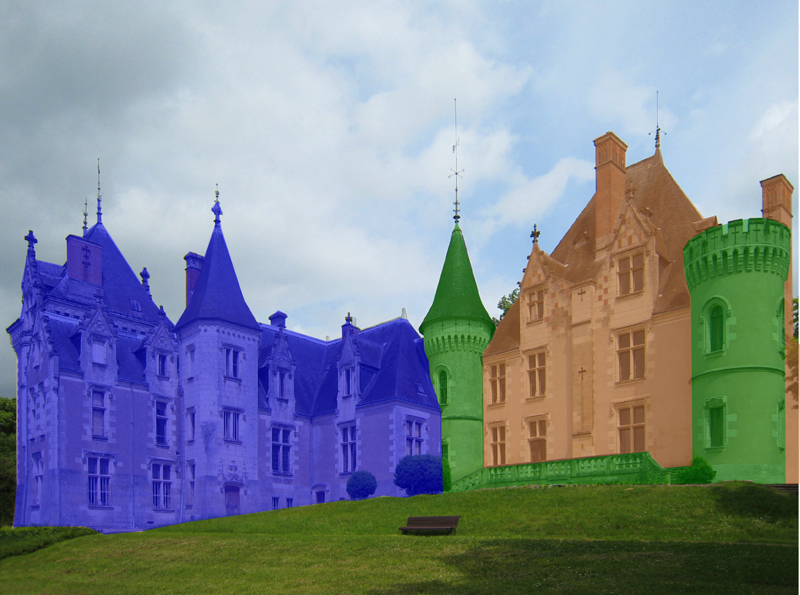 Phases de construction du château : Renaissance (bistre), 1854-55 (vert), 1864-67 (bleu)